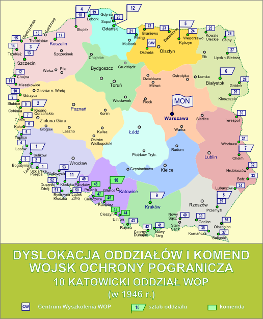 Dyslokacja oddziałów i komend Wojsk Ochrony Pogranicza w październiku 1946 r. - 10 Katowicki Oddział WOP